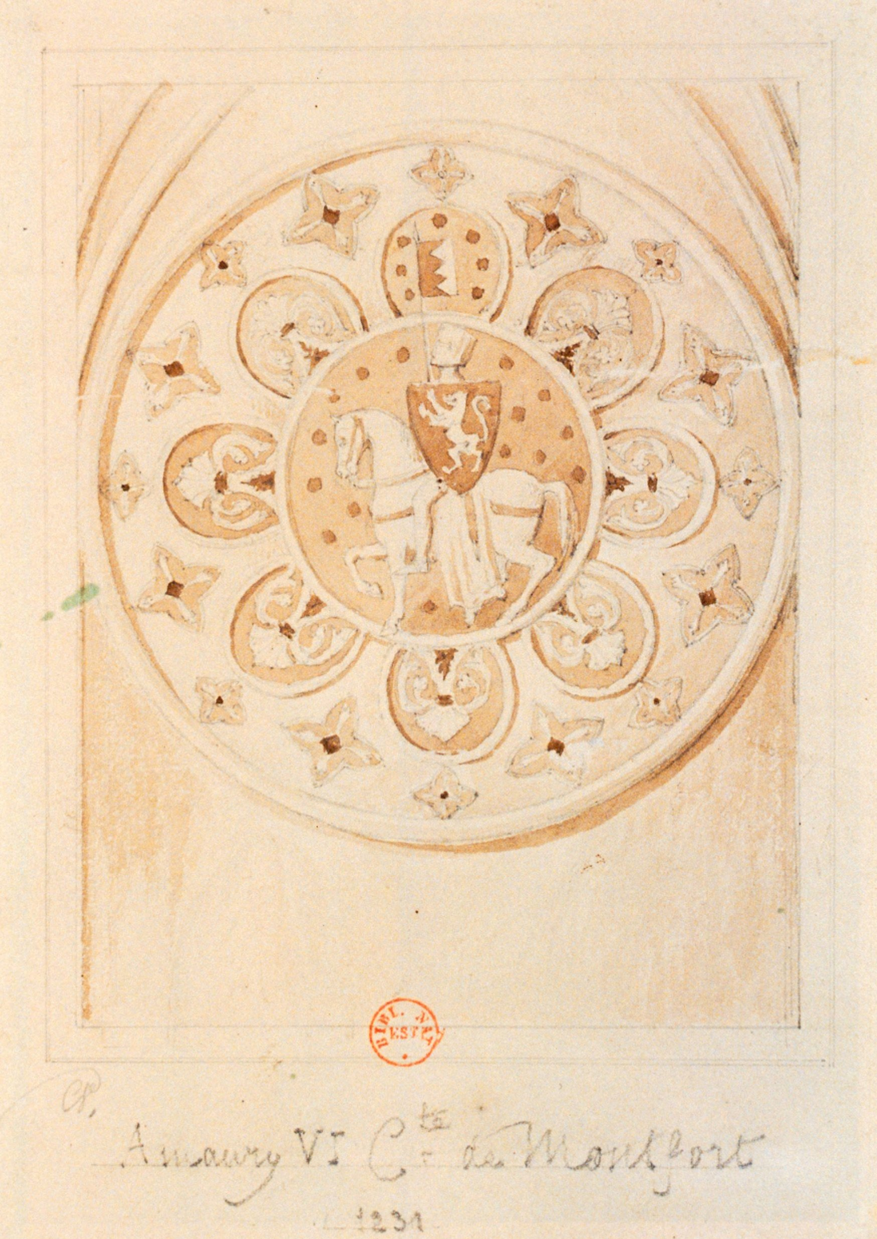 Amaury VI. Comte de Montfort. 1231. d'après un vitrail de la Cathédrale de Chartres